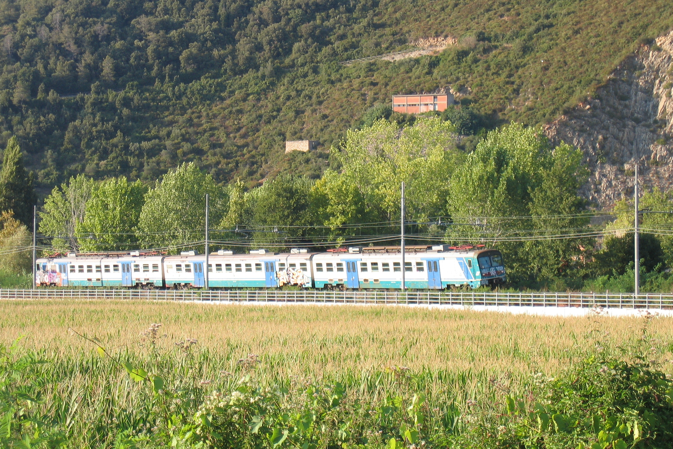 Treno Lucca-Pisa